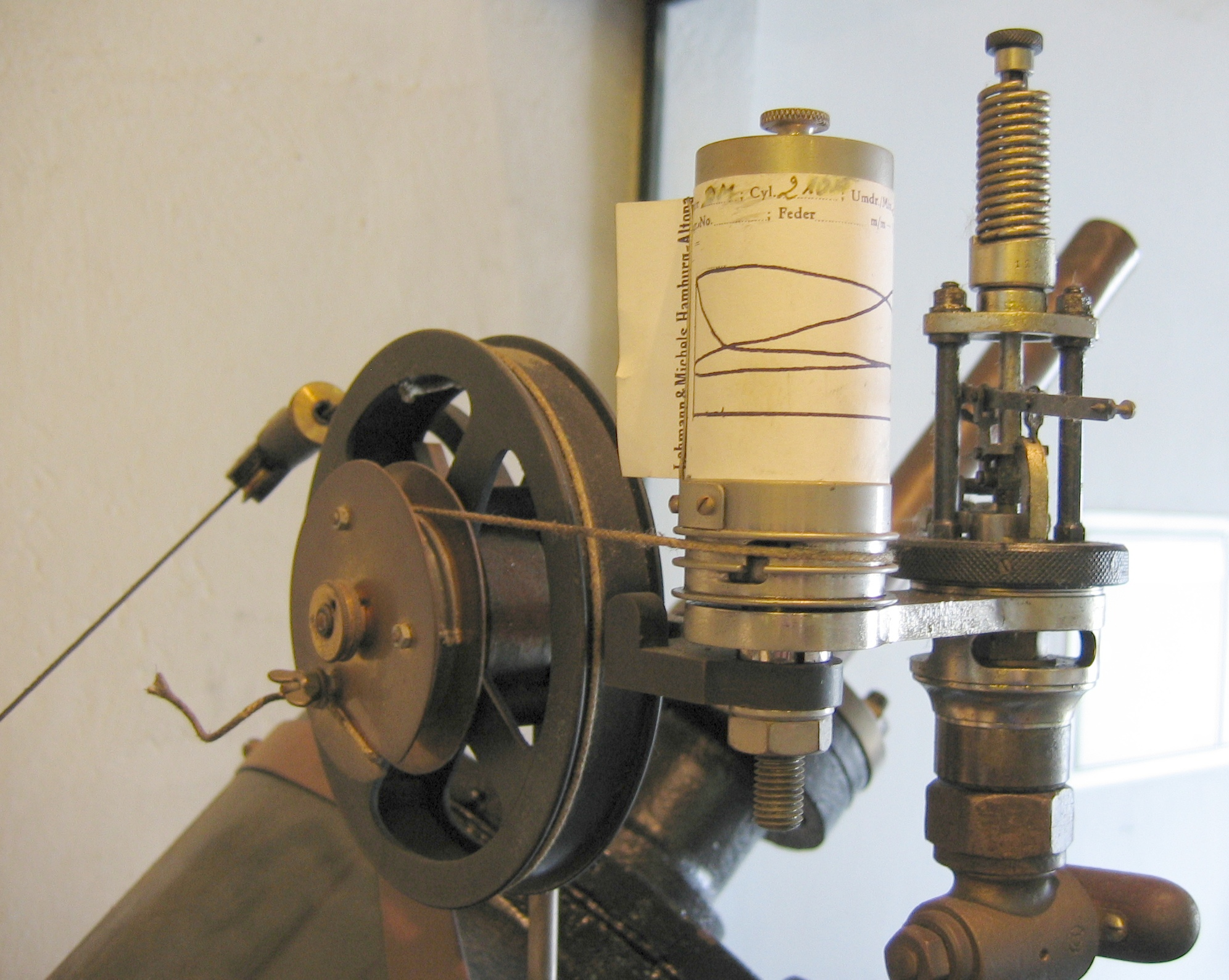 Indikator einer Dampfmaschine. Links im Hintergrund der Zugfaden zur Messung der Kolbenposition, rechts (abgeklappt) der Schreibstift.